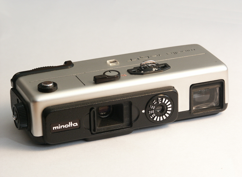 Minolta 16 QT 16mm subminiature camera, c. 1972.